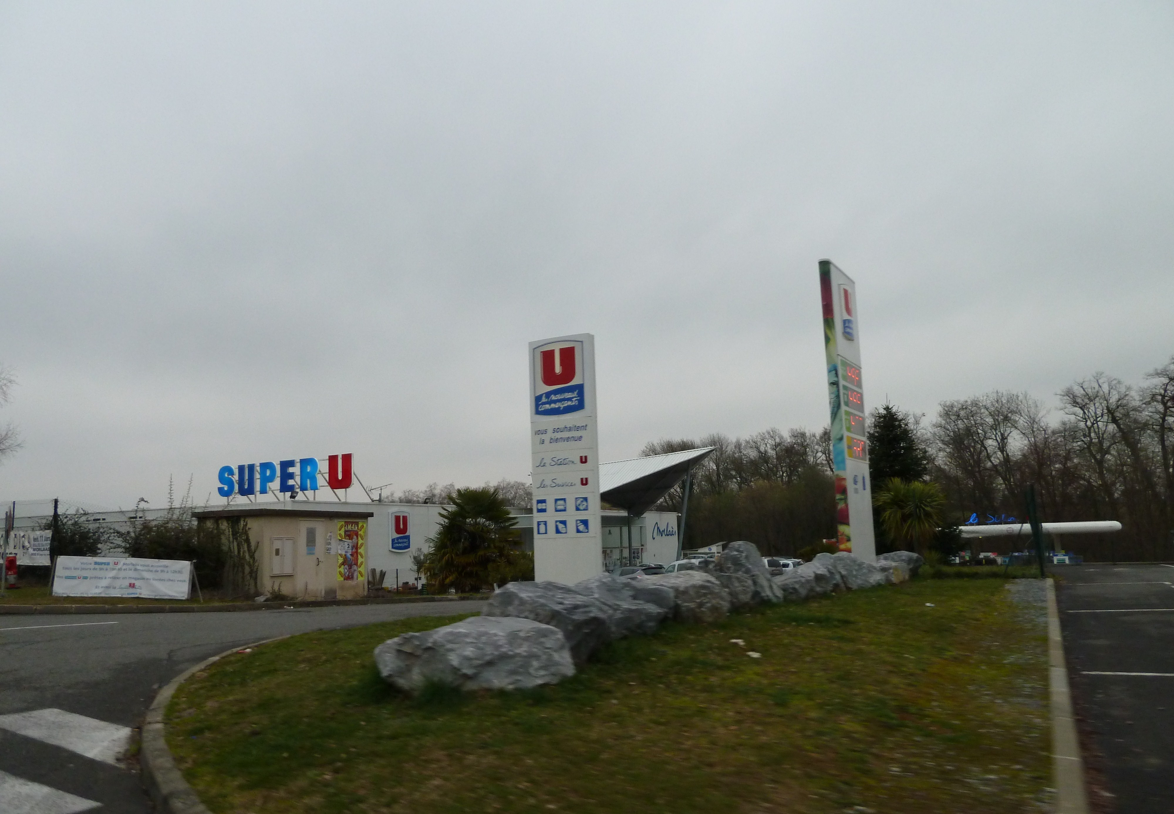 Super-U Morlaàs